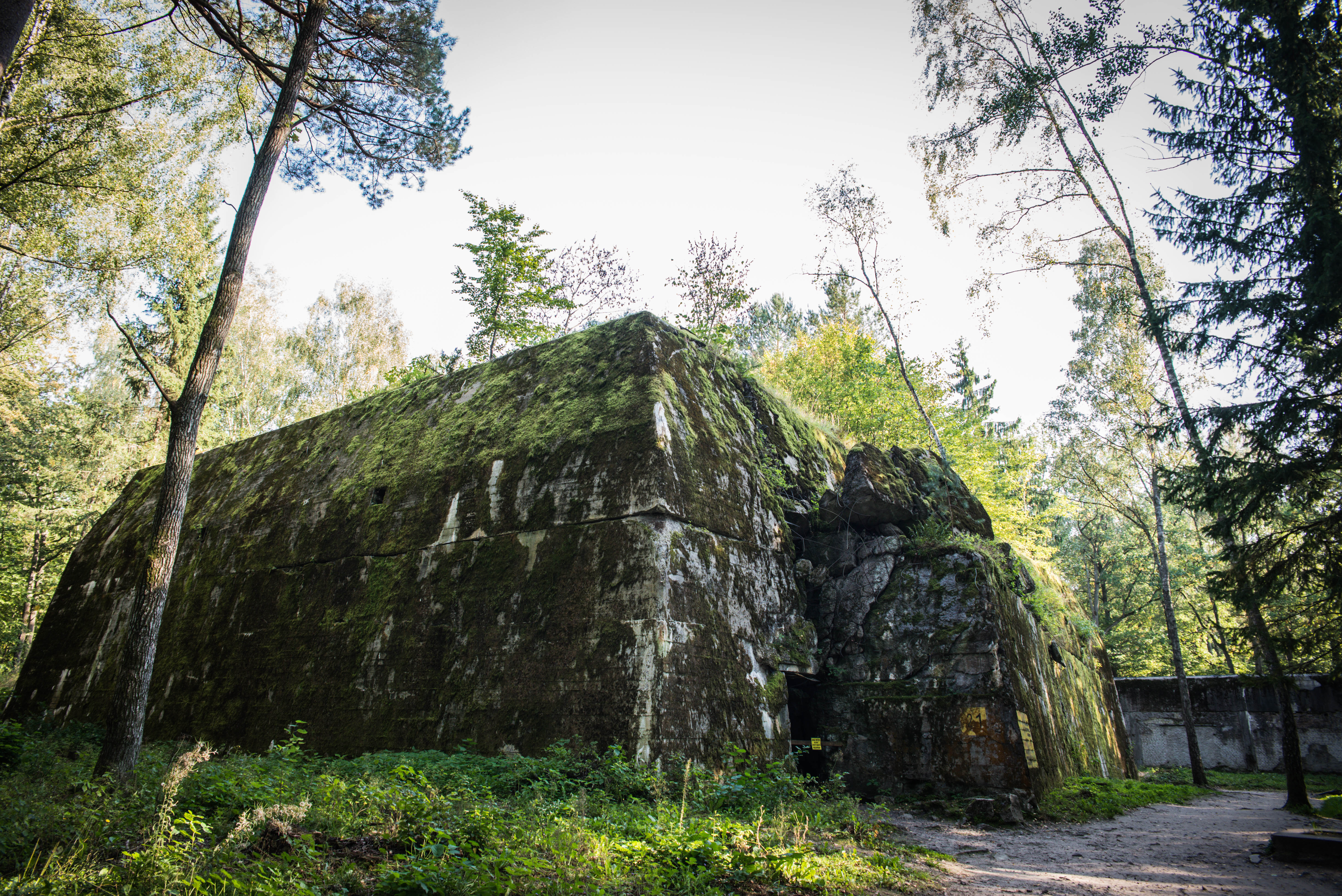 Kwatera główna Adolfa Hitlera w latach 1941–1944.